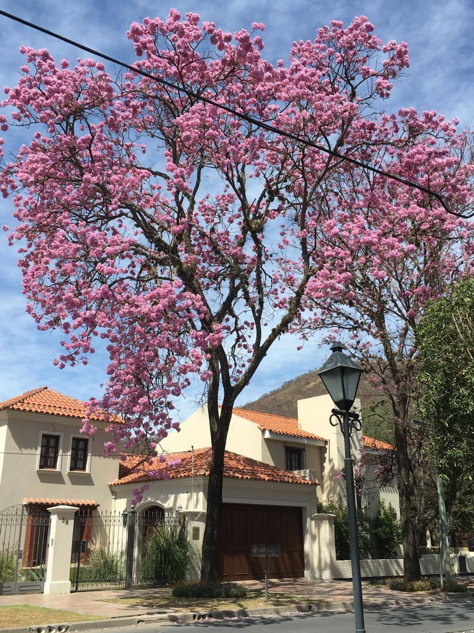 Handroanthus impetiginosus o Tabebuia impetiginosa (lapacho rosado) del Barrio Tres Cerritos de la Ciudad de Salta en floración.